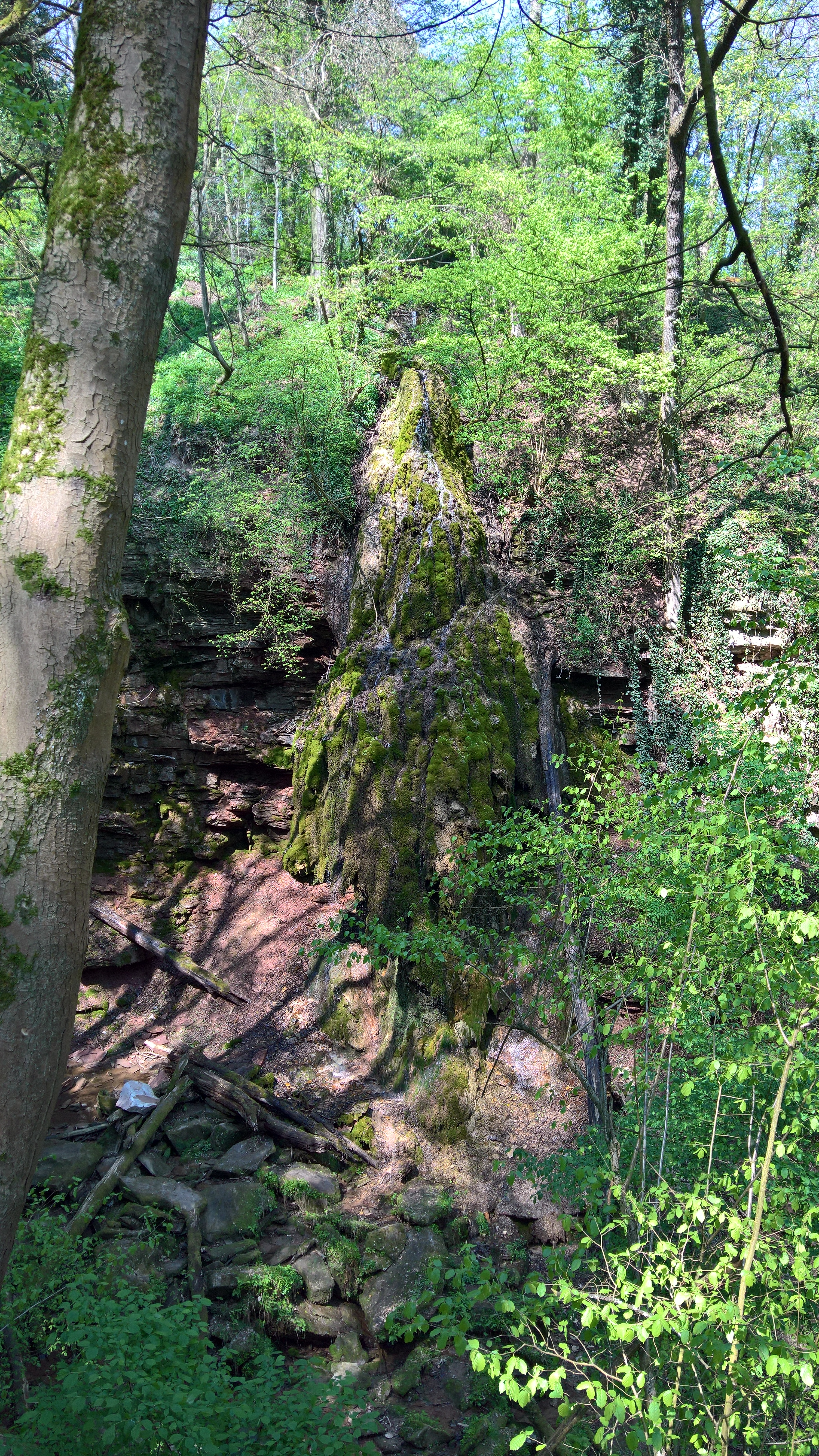 Der Klingerbach (auch Klingelbachgraben, Klingelbach, Klingenbach) 700 m nordwestlich vom Kloster Triefenstein als Durchbruch von der Sandsteinstufe des Spessart zur Maintal. Der südliche Sandsteinrand (hier im Bild) ist als Geotop ausgewiesen.